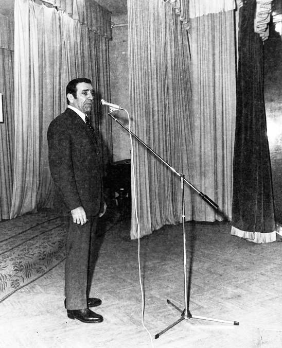 Bárdy György a Ganz Műszer Művek rendezvényén